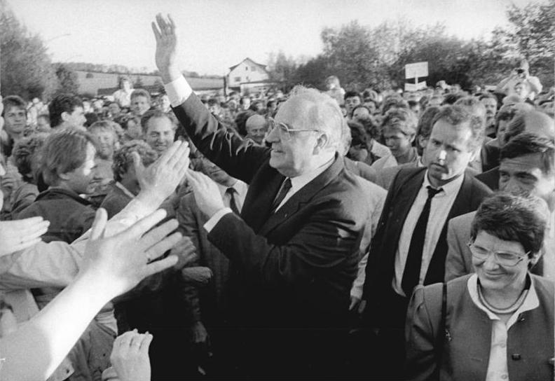 Duderstadt, Helmut Kohl und Rita Süssmuth auf CDU-Wahlkundgebung ADN-Grimm 26 2.5.90 Bez. Erfurt: CDU-Wahlkundgebung bei Duderstadt. Hunderte Eichsfelder aus Ost und West begrüßten Bundeskanzler Dr. Helmut Kohl (M) und Bundestagspräsidentin Prof. Dr. Rita Süssmuth (r) zu einer gemeinsamen Wahlveranstaltung der CDU Niedersachsens und Thüringens. Abgebildete Personen: Kohl, Helmut: Bundeskanzler, Ministerpräsident von Rheinland-Pfalz, CDU, Bundesrepublik Deutschland (GND 118564595) Süssmuth, Rita Dr.: Präsidentin des Bundestages, CDU, Bundesrepublik Deutschland